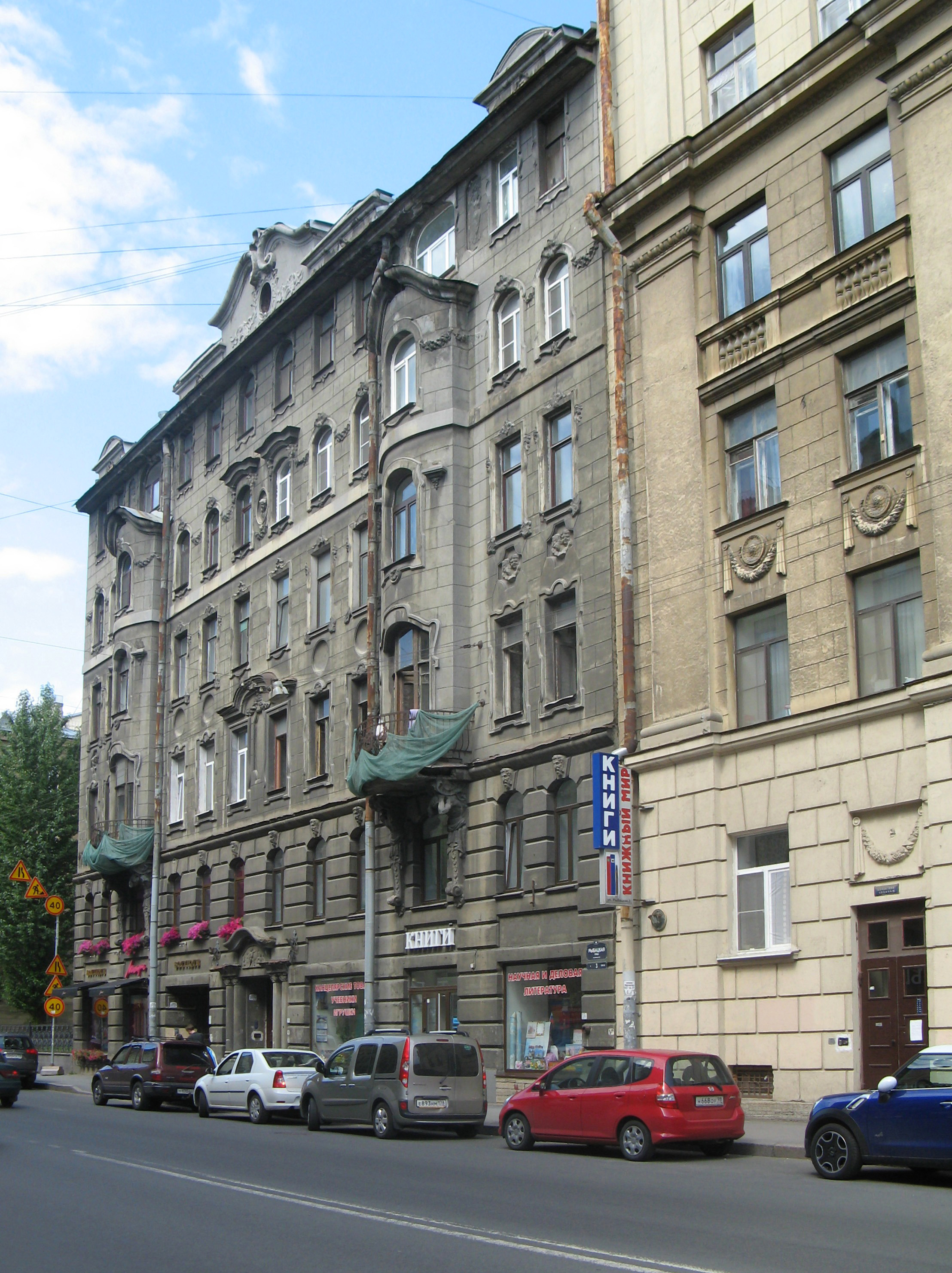 Рыбацкая улица в Санкт-Петербурге, дом №3